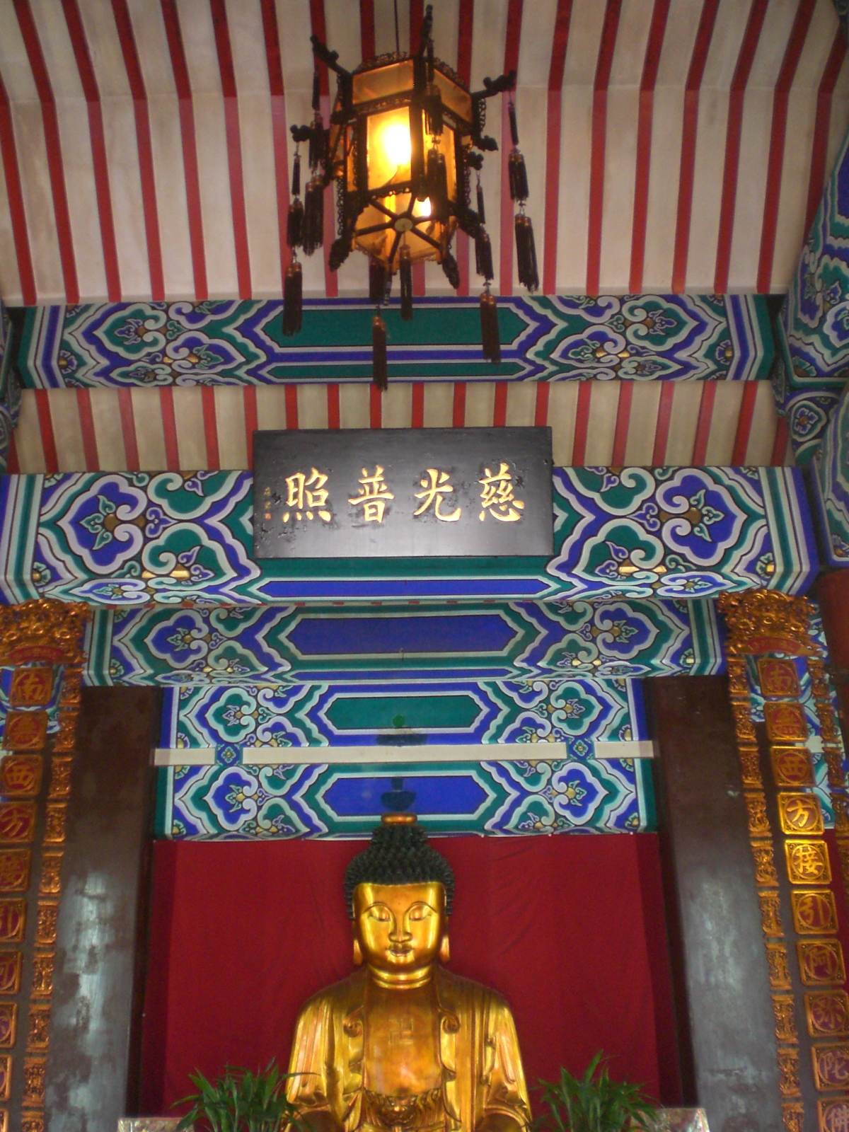 沙田寶福山園內環境 大雄寶殿